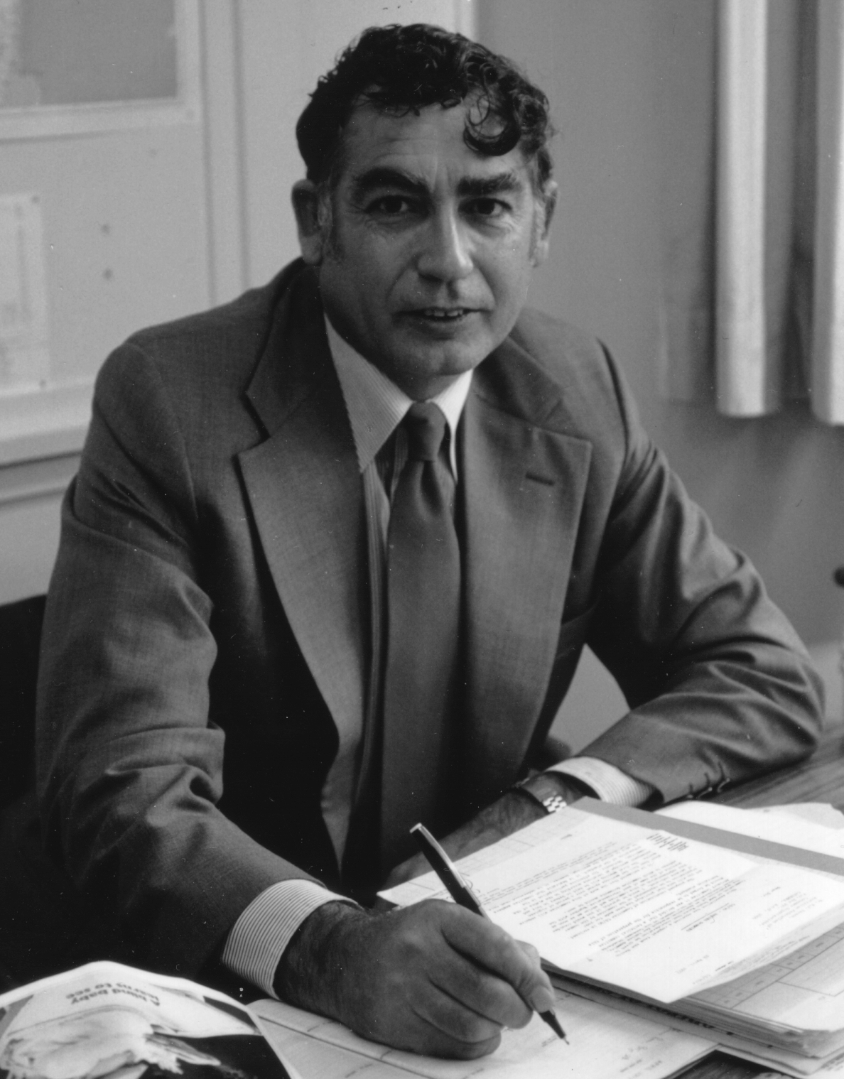 Michael John Vernon AM c1980